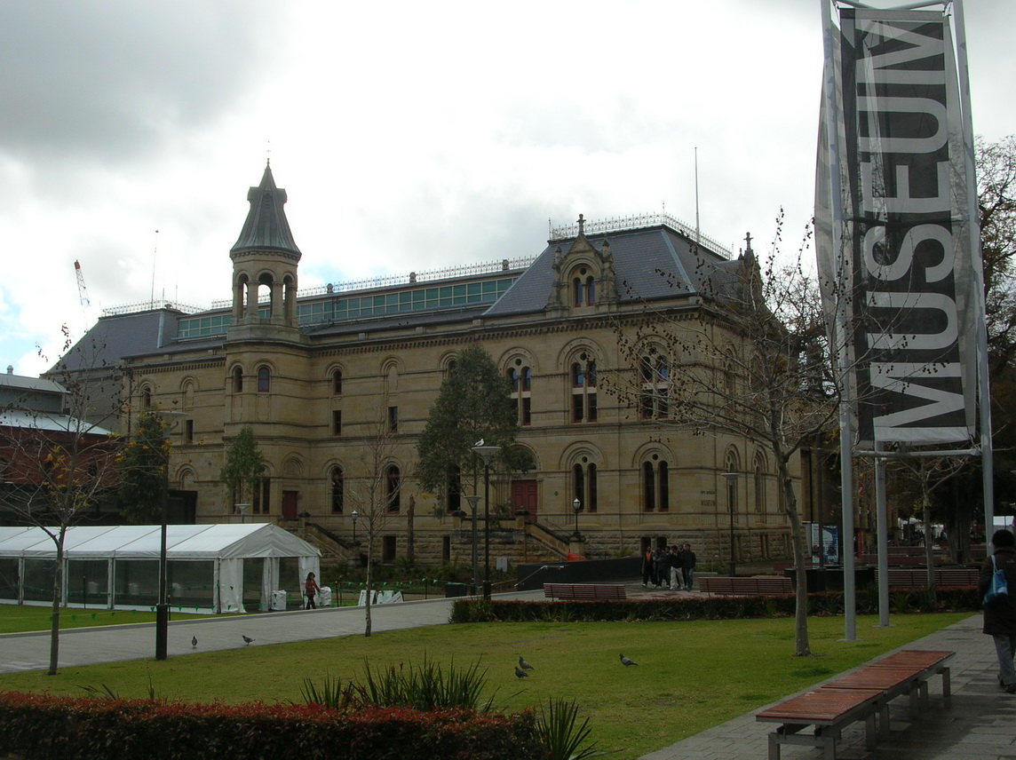 南澳洲博物館 South Australian Museum